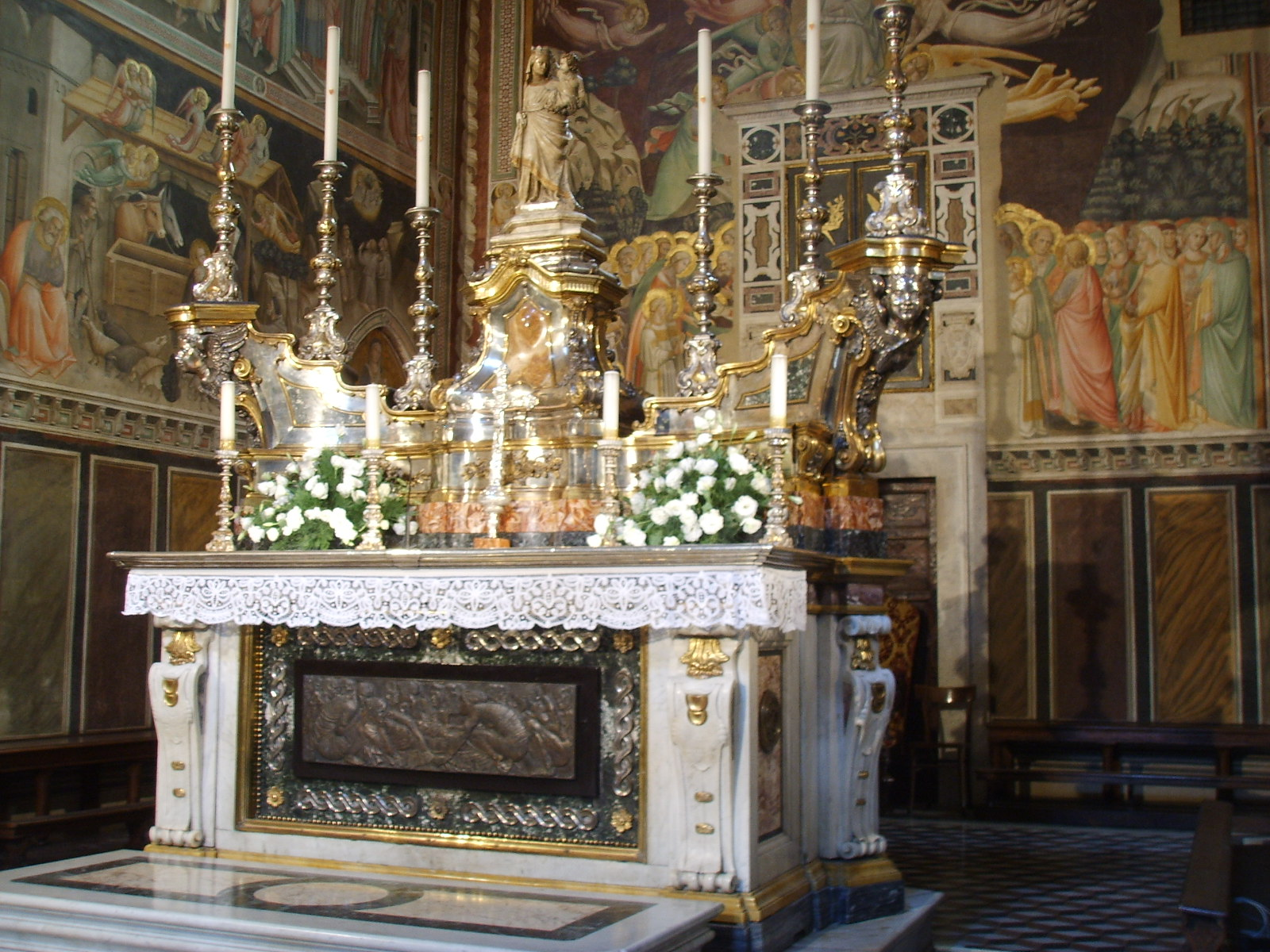 Duomo, Cappella del Sacro Cingolo, frescos by Agnolo Gaddi, Prato, Italy